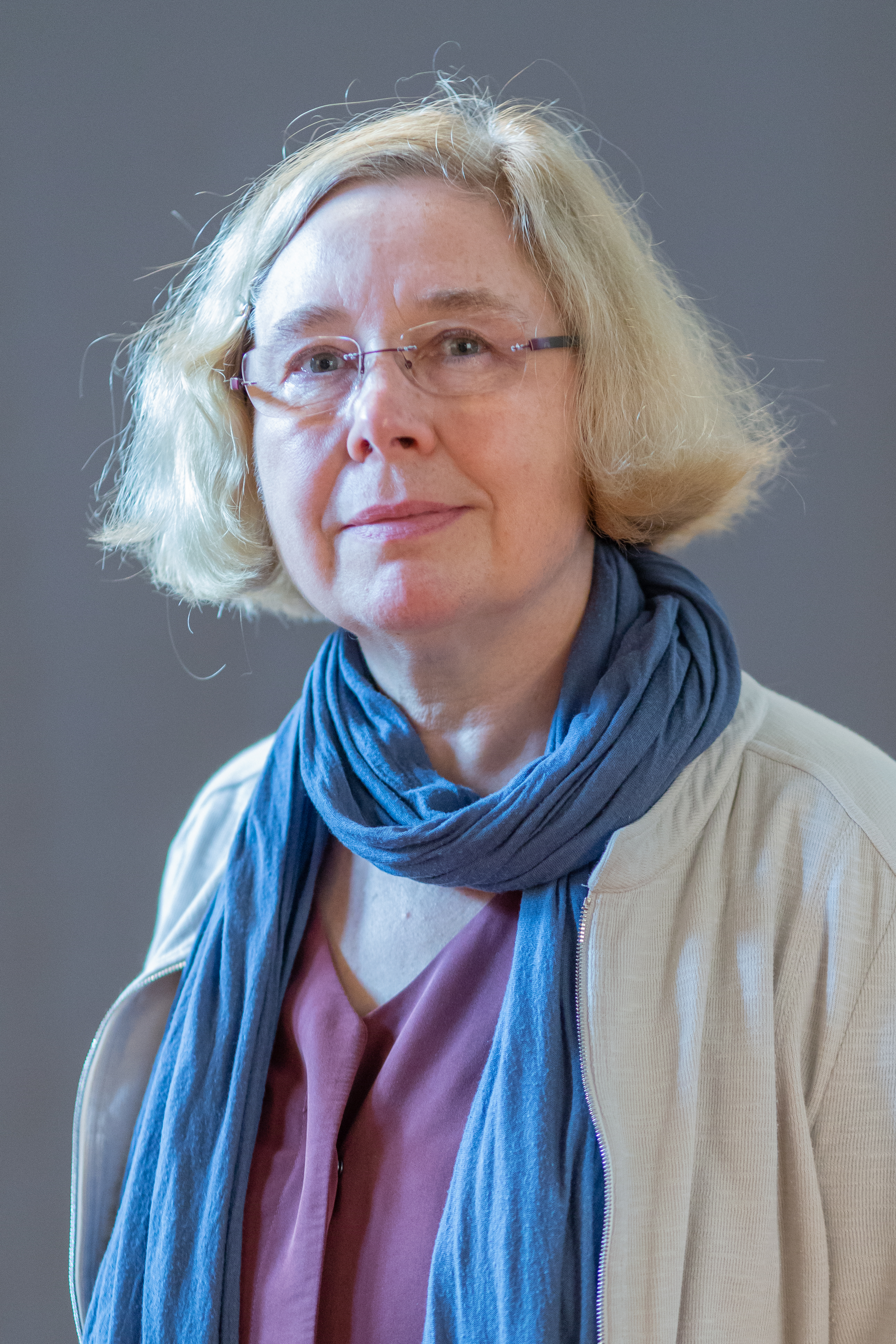 Abgeordnete(r) der Bürgerschaft der Freien und Hansestadt Hamburg Ulrike Sparr